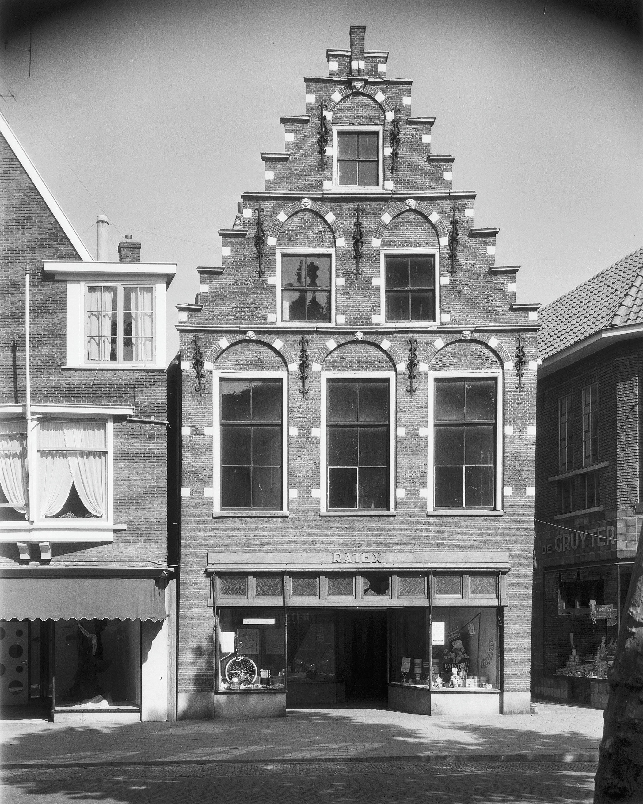 GEBOORTEHUIS SIMON VESTDIJK: voorgevel